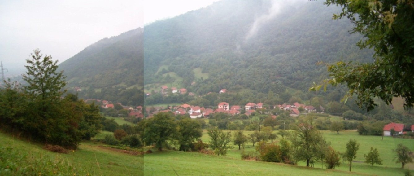 Ћурковица